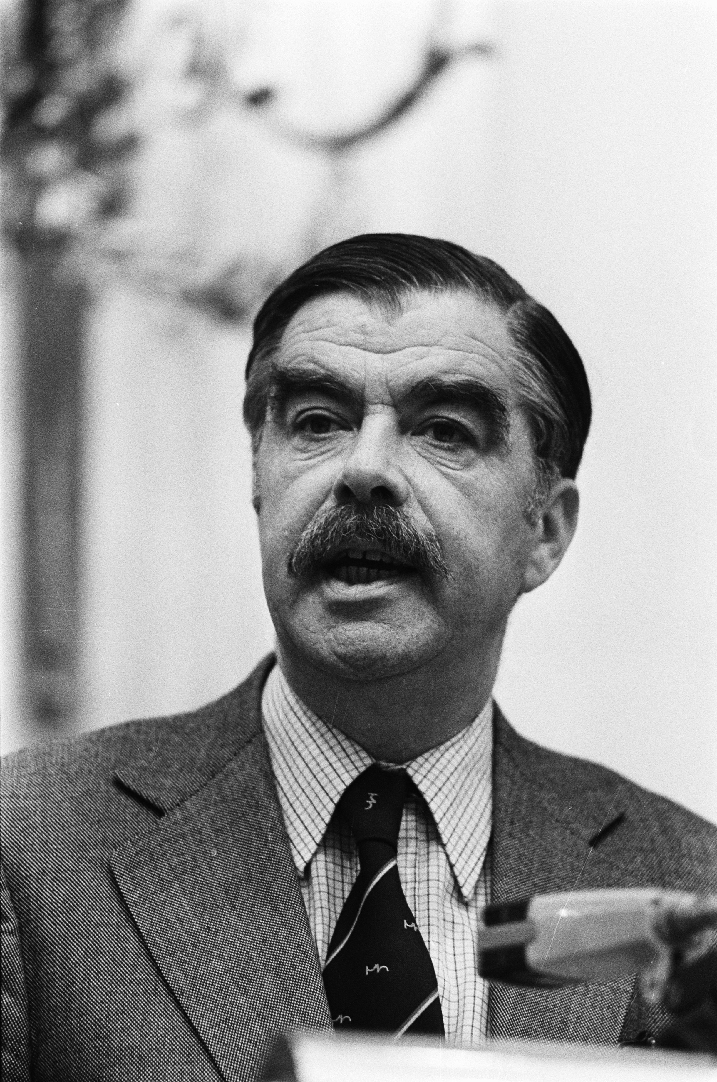 Collectie / Archief : Fotocollectie Anefo Reportage / Serie : Tweede Kamer debat over modernisering kernwapens Beschrijving : Ad Ploeg van de VVD aan het woord Datum : 6 december 1979 Locatie : Den Haag, Zuid-Holland Trefwoorden : kernwapens, parlementaire debatten, politiek, portretten Persoonsnaam : Ploeg, Ad Instellingsnaam : Tweede Kamer, VVD Fotograaf : Koen Suyk Auteursrechthebbende : Nationaal Archief Materiaalsoort : Negatief (zwart/wit) Nummer archiefinventaris : bekijk toegang 2.24.01.05 Bestanddeelnummer : 930-5739